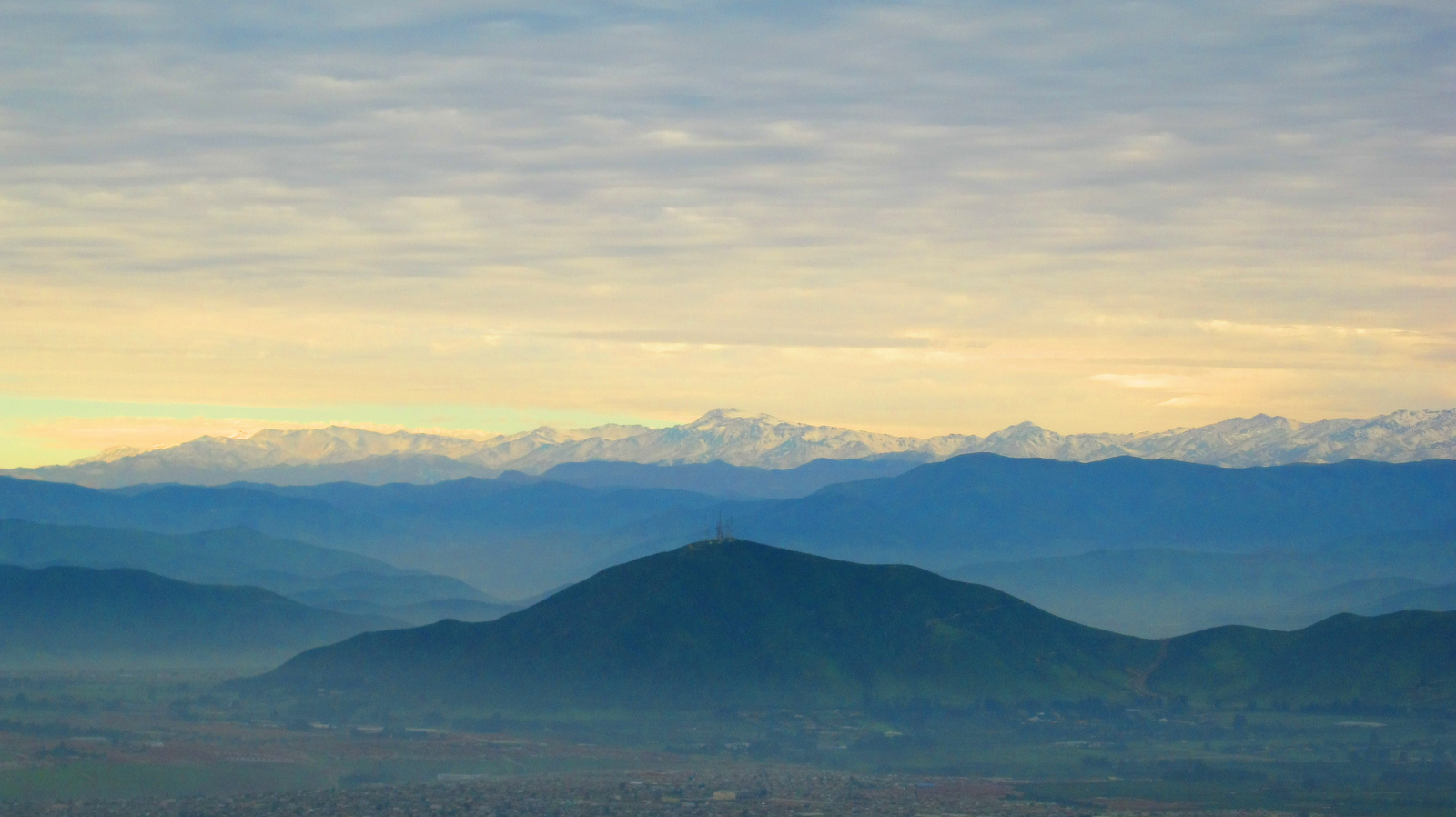 Vista del Cerro Grande en La Serena, Chile.